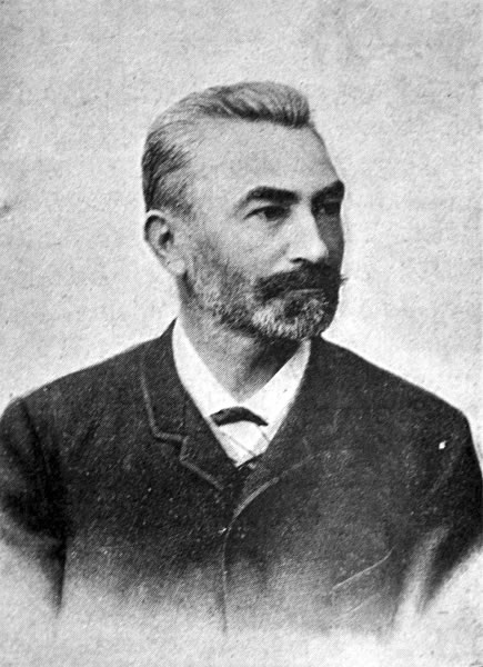 Архітектор Юзеф Гусс (1846-1904).